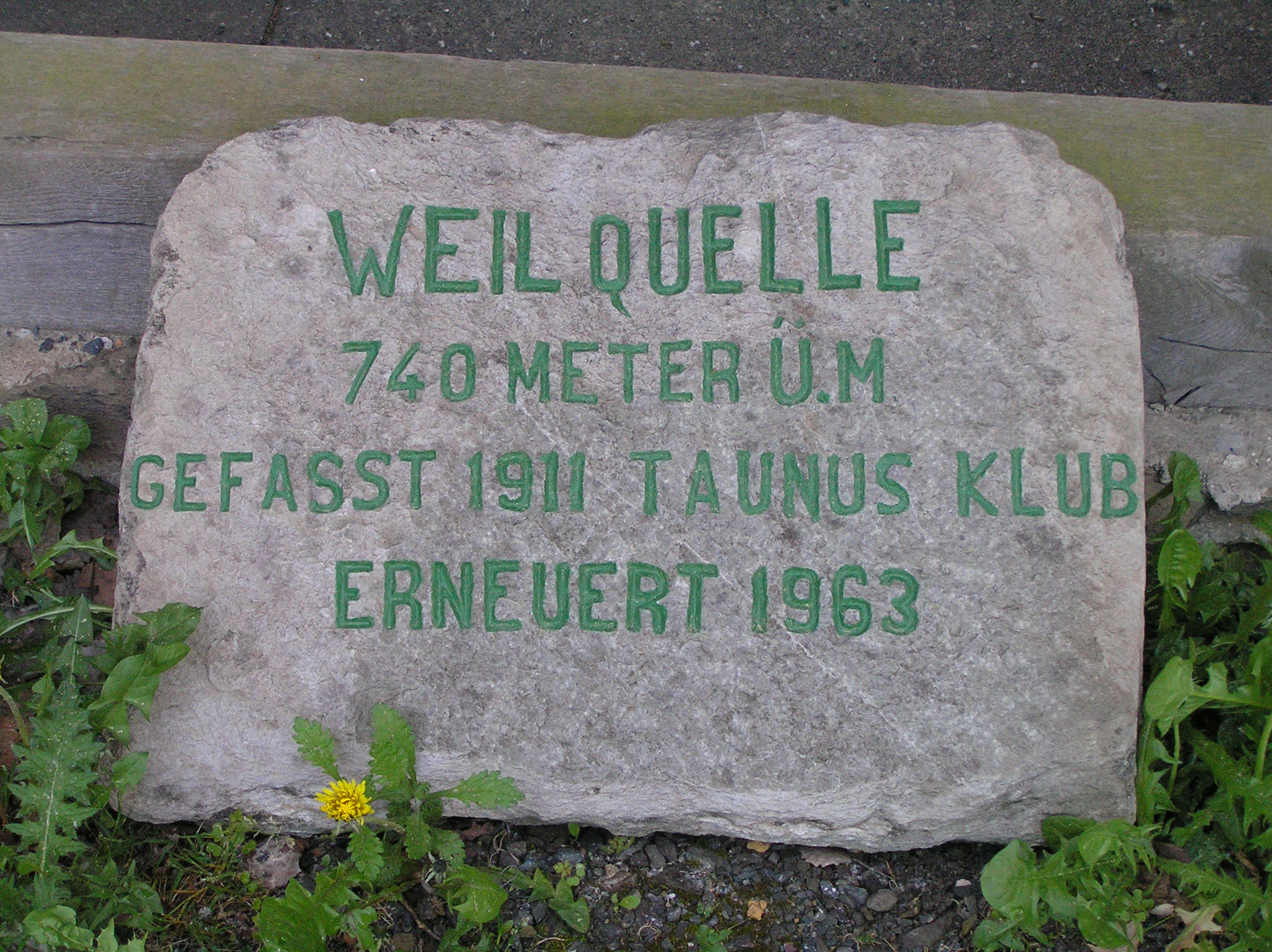 Gedenkstein zur Erneuerung der Fassung der Weilquelle im Jahr 1963 durch den Taunusklub. Der Stein befindet sich nicht mehr am ursprünglichen Platz sondern im Hessenpark